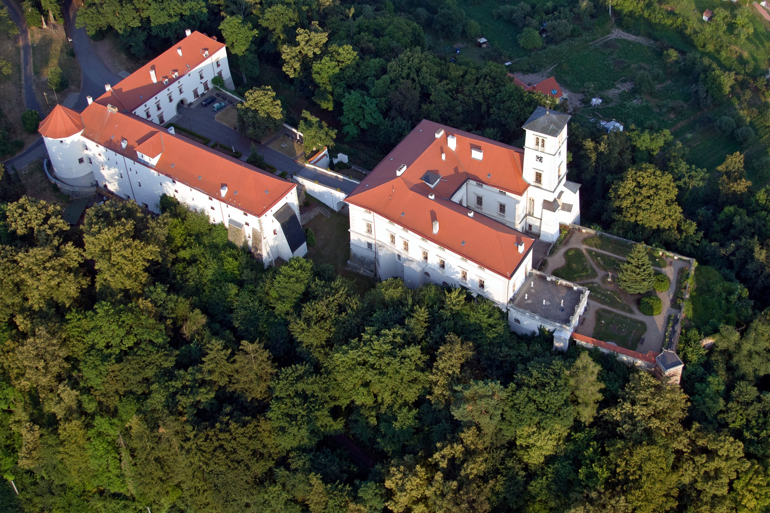 Zámek Černá Hora, Na pasece 1, Černá Hora